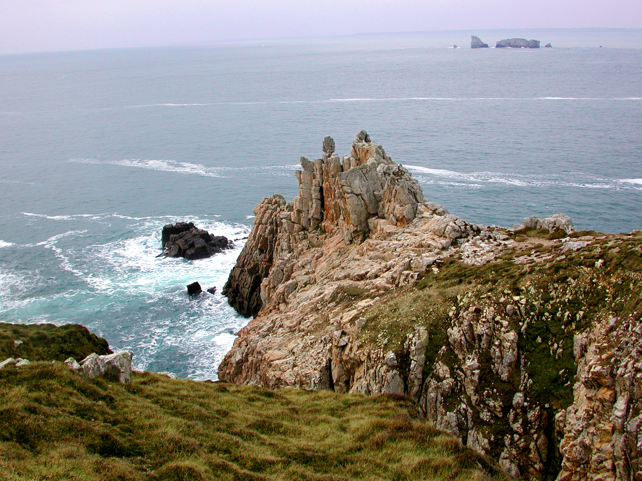 Ailleanna i gCamaret ar chosta thiar Penn-Ar-Bed, An Bhriotain.